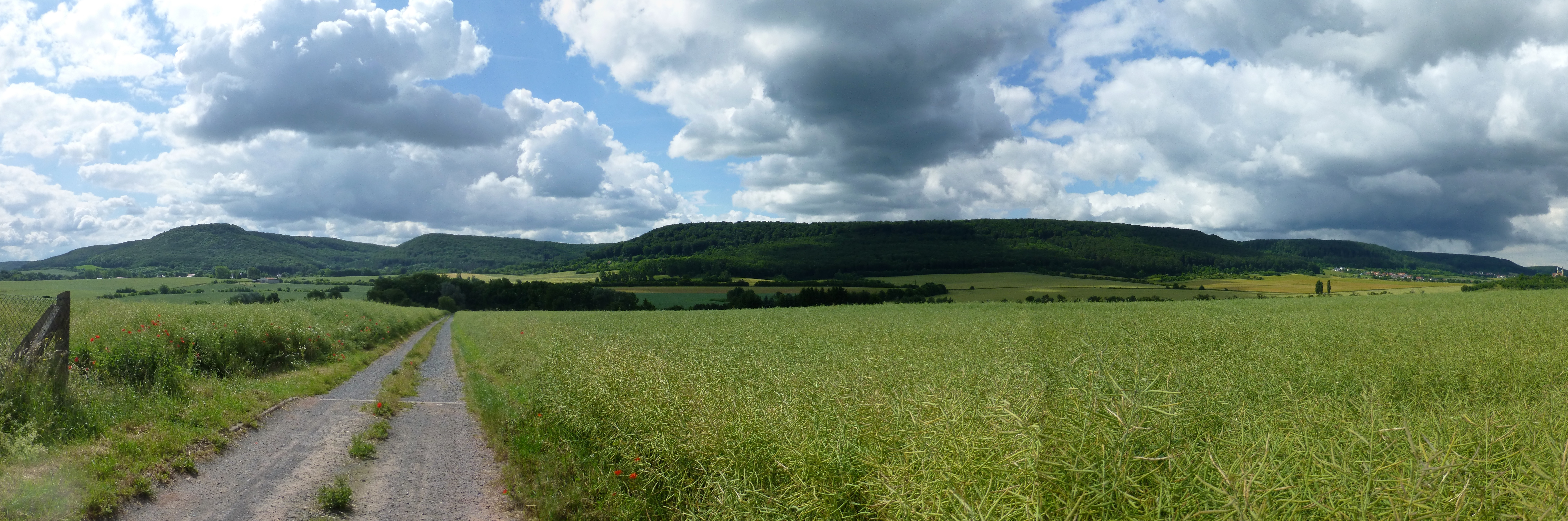 Panorama der Hainleite bei Hainrode